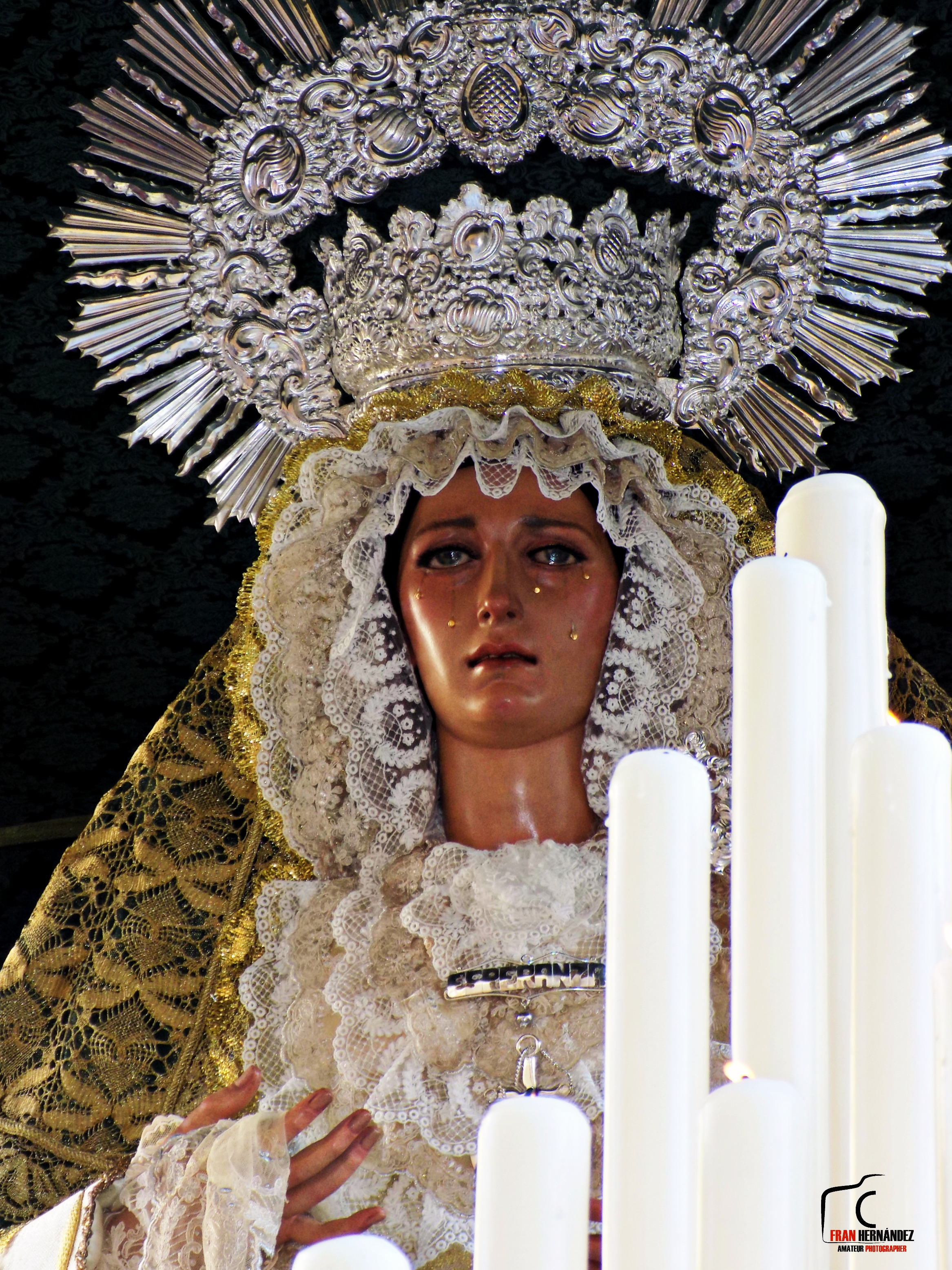 Ntra. Sra. de la Esperanza y Misericordia (Adra, Almería)